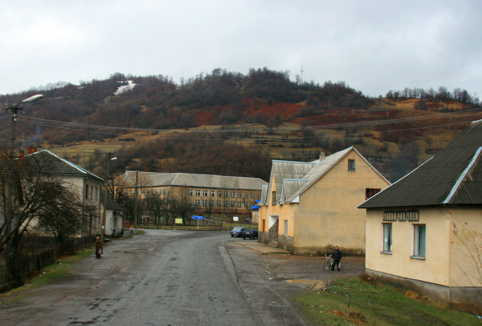 Центр села Волосянка на Закарпатье.